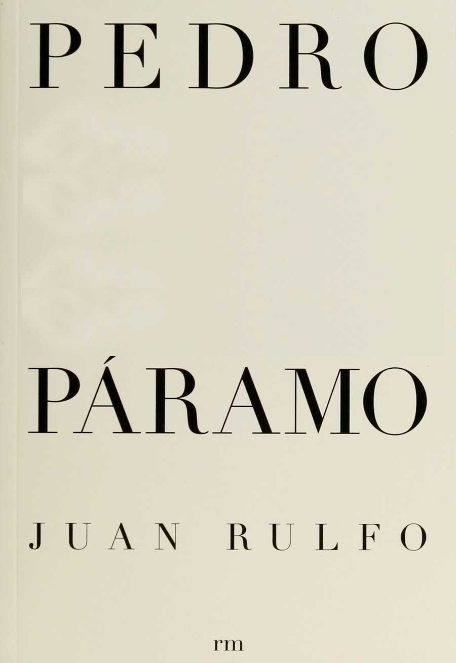 Portada simplificada de la edición de Pedro Páramo publicada por la editorial RM Verlag con motivo de los 50 años de la obra.